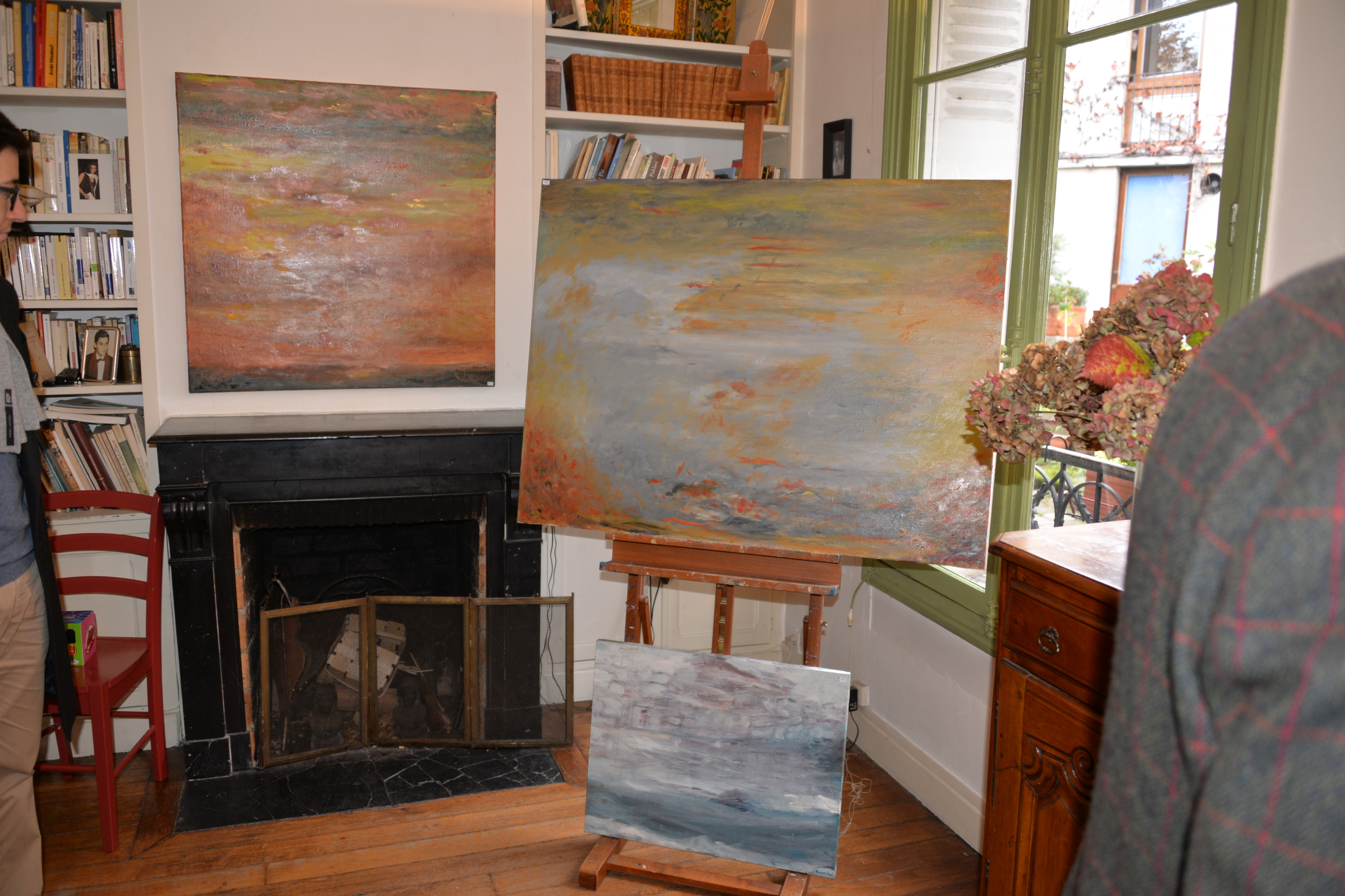 2014 11 23 exposition des artistes galerie villa gabriel ,tableaux sur toile